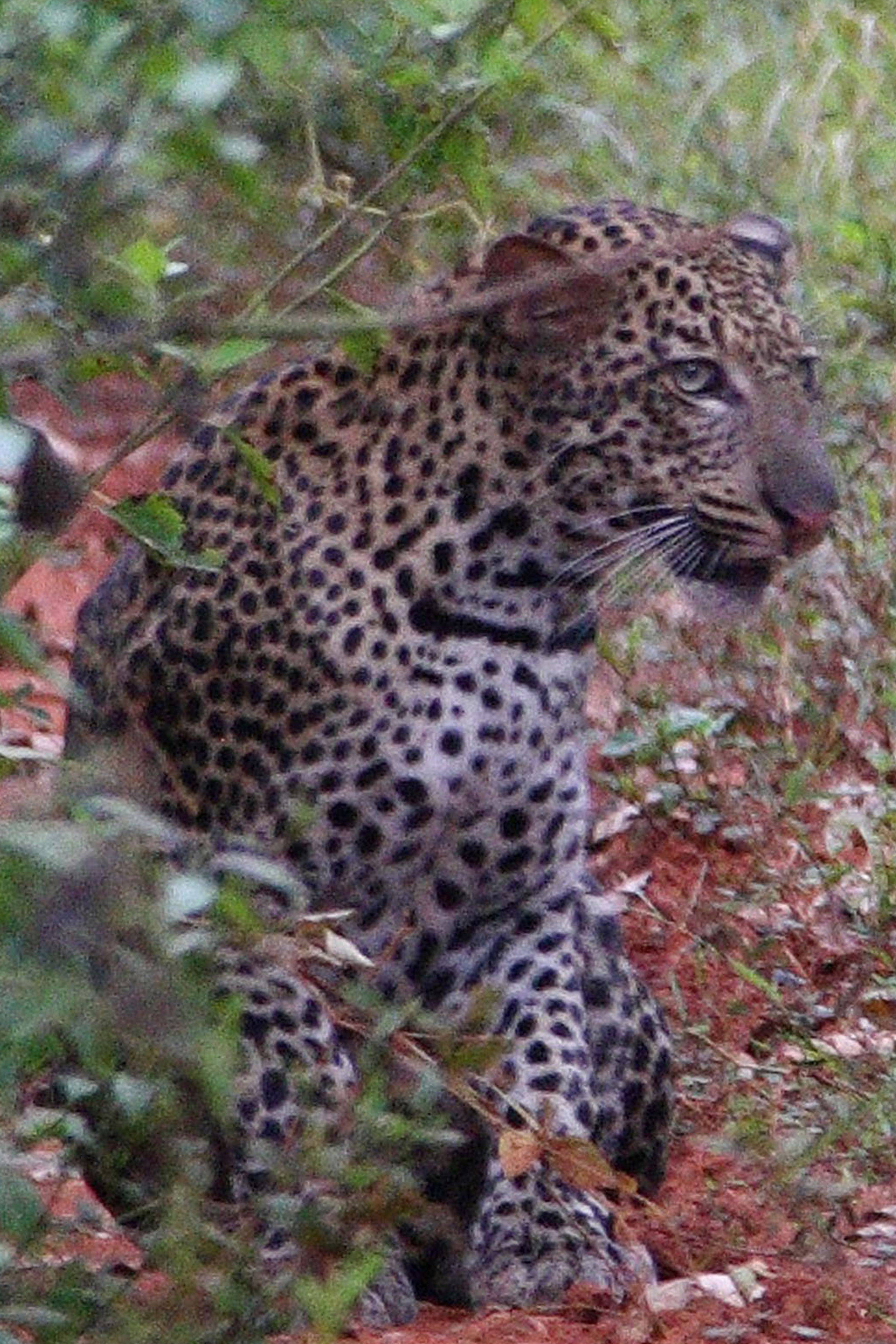 Panthère dans le Parc National de Lobéké au Sud-Est du Cameroun